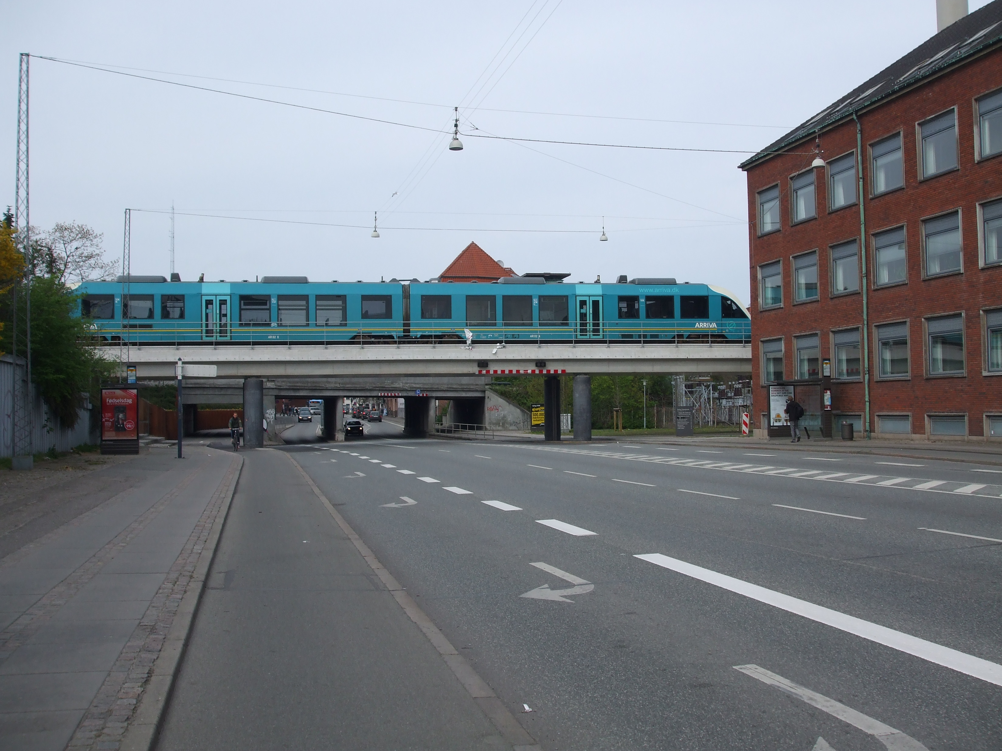 Arriva-pendlertog (model AR 07 ?) passerer Spanien i Århus